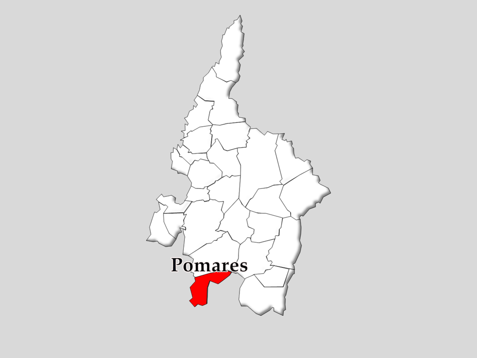 Censo 1864/2111